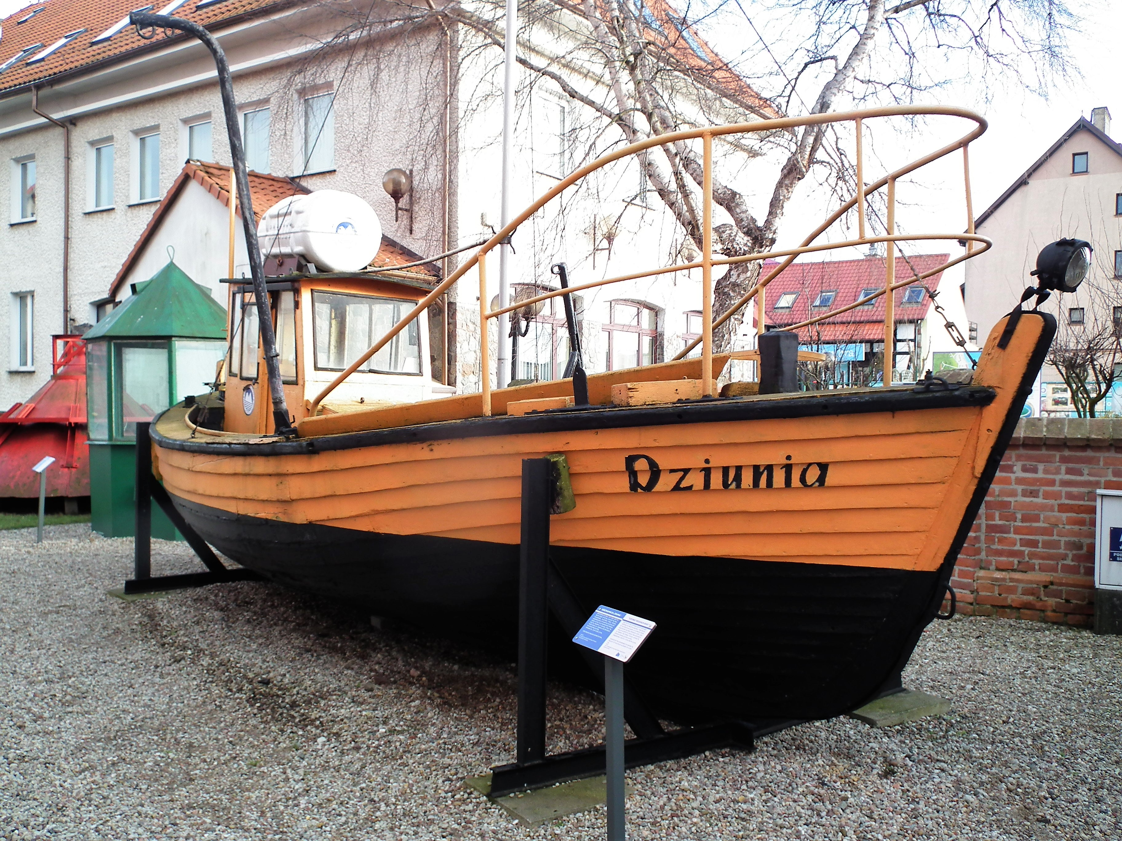 Polska arktyczna łódź badawcza Dziunia w Muzeum Rybackim na Helu.